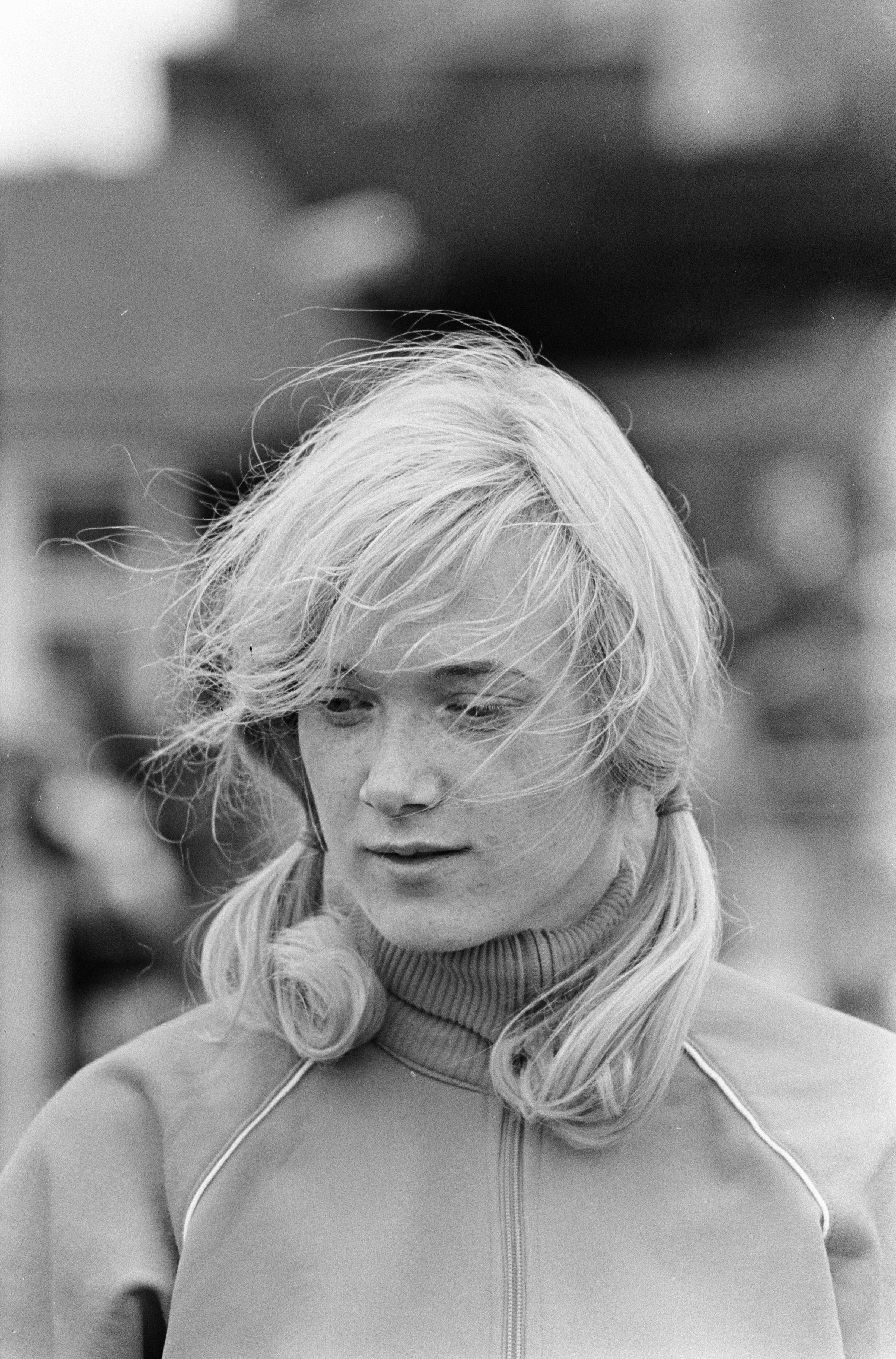 Collectie / Archief : Fotocollectie Anefo Reportage / Serie : [ onbekend ] Beschrijving : Atletiek, Corrie Bakker (kop) Datum : 15 augustus 1966 Trefwoorden : ATLETIEK Persoonsnaam : Bakker, Corrie Fotograaf : Kroon, Ron / Anefo Auteursrechthebbende : Nationaal Archief Materiaalsoort : Negatief (zwart/wit) Nummer archiefinventaris : bekijk toegang 2.24.01.05 Bestanddeelnummer : 919-4526